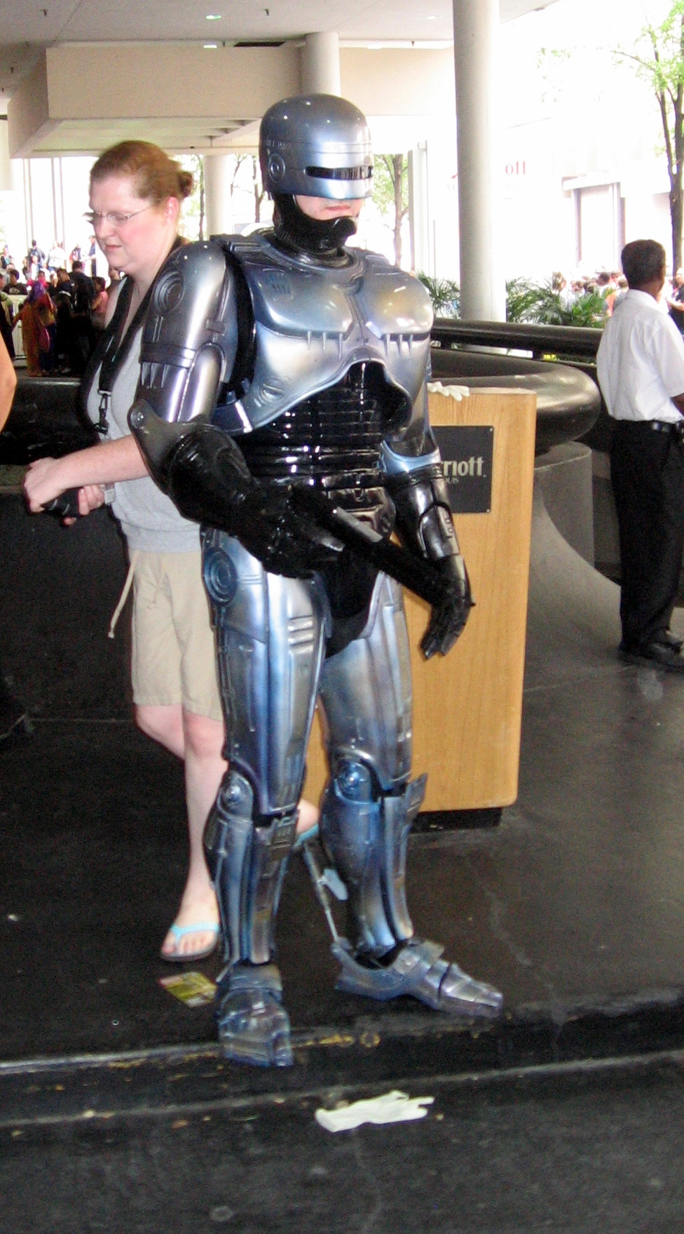 Robocop